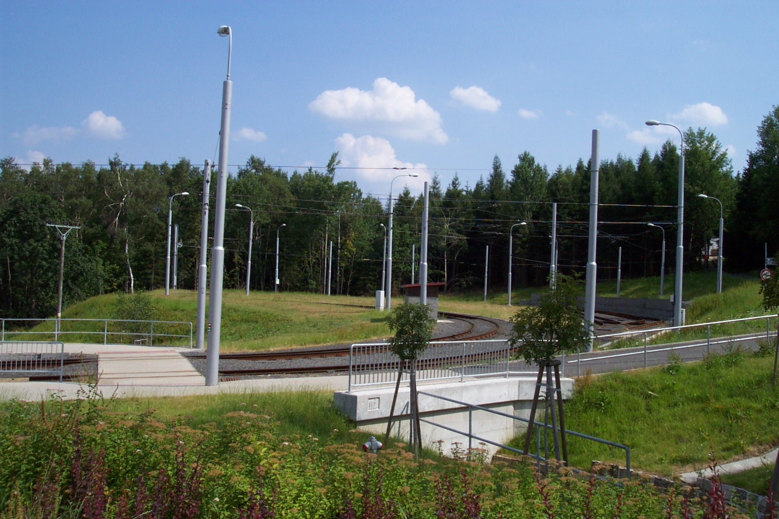 Tram terminus in Liberec, CZ - Liberec, Horní Hanychov, Tramvajové obratiště